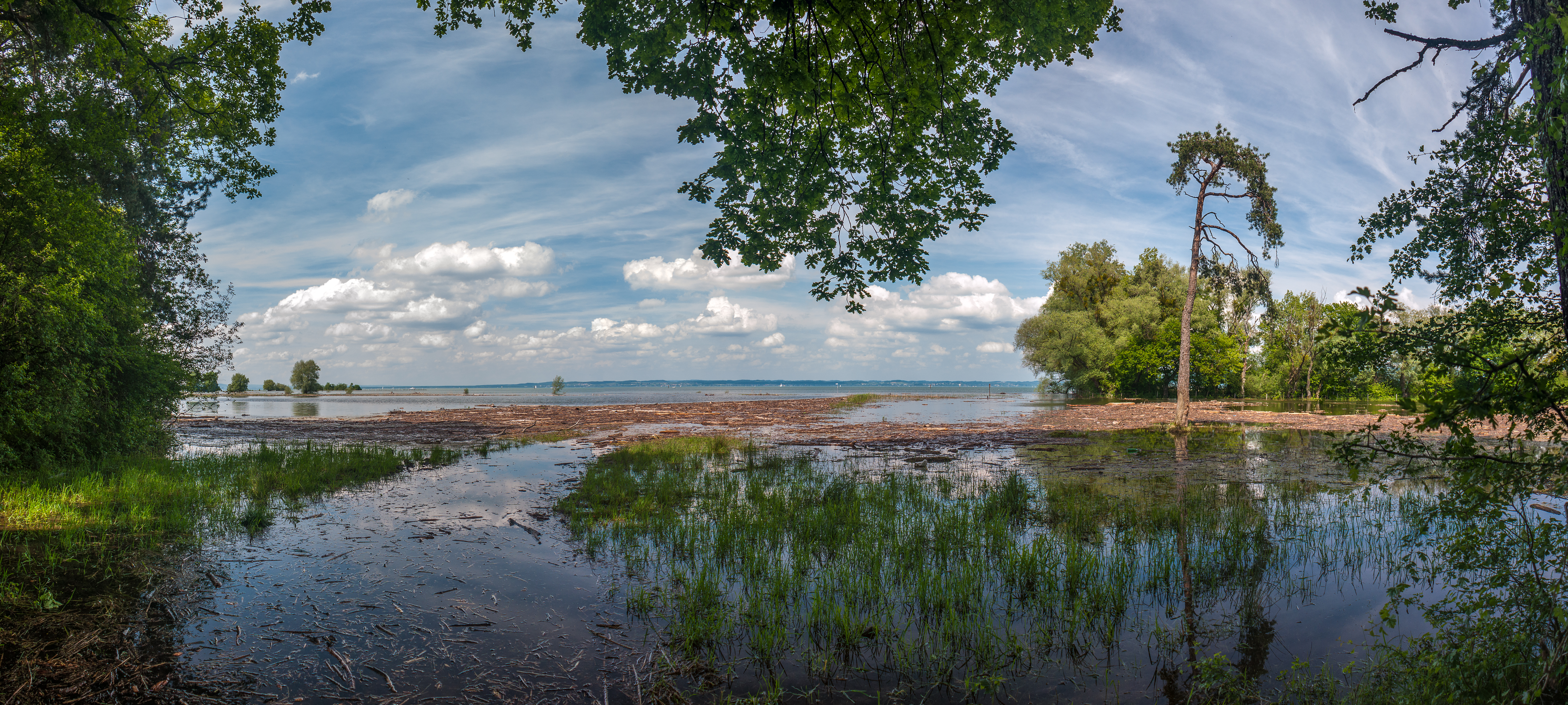 Hochwasser im Rheinholz am 5.6.2013 im Hintergrund sieht man das Deutsche Bodenseeufer. Panorama aus 3 Fotos. This media shows the nature reserve in Vorarlberg with the ID 8047.